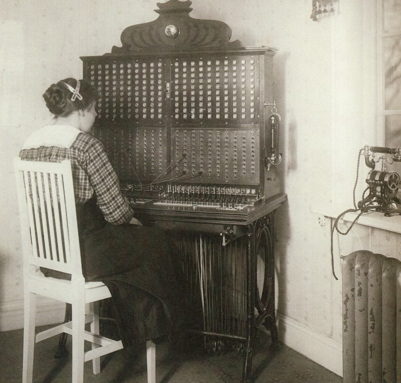 Svensk telefonist med växelbord från 1897(Dalaeus 1994; Bilden tagen på 1910-talet)